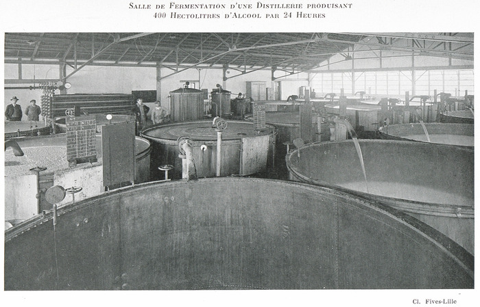 Salle de fermentation d'une distillerie produisant 400 hectolitres d'alcool par 24 heures